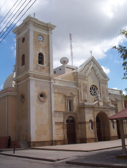 Catedral de Riohacha, La Guajira - Colombia